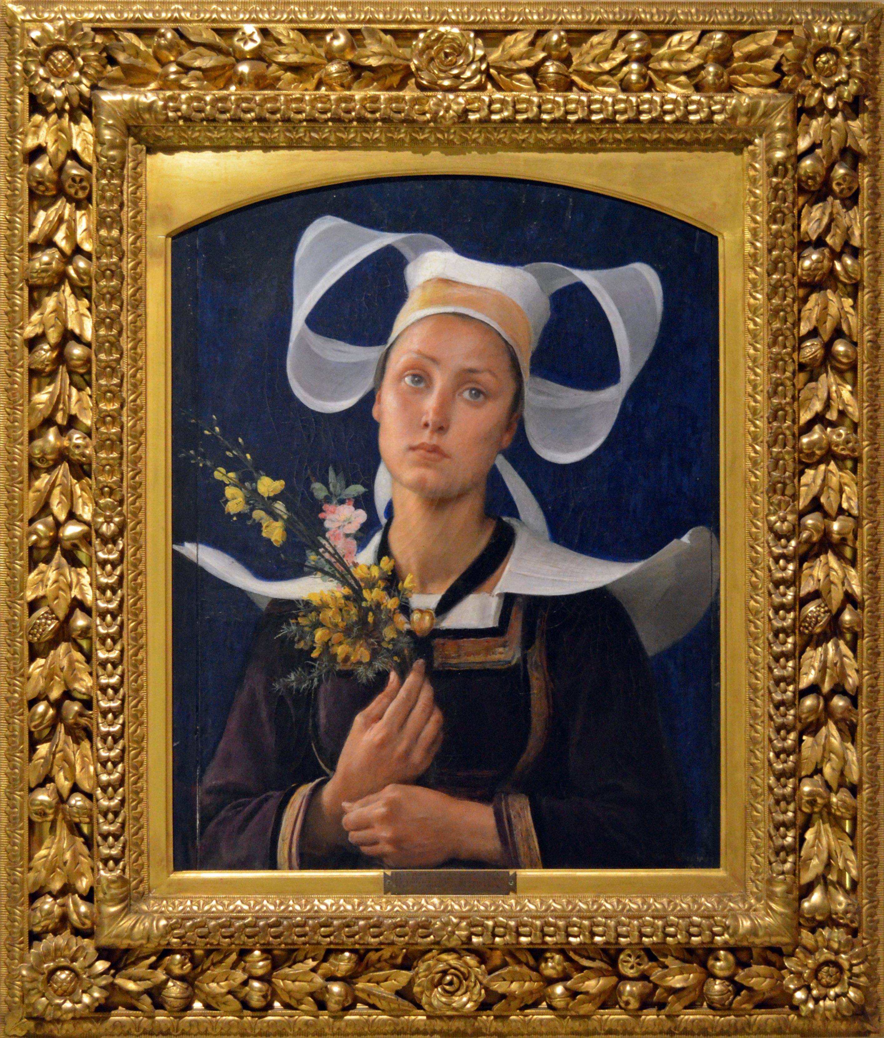 Tableau ayant servi d'illustration pour la biscuiterie Lefèvre-Utile.